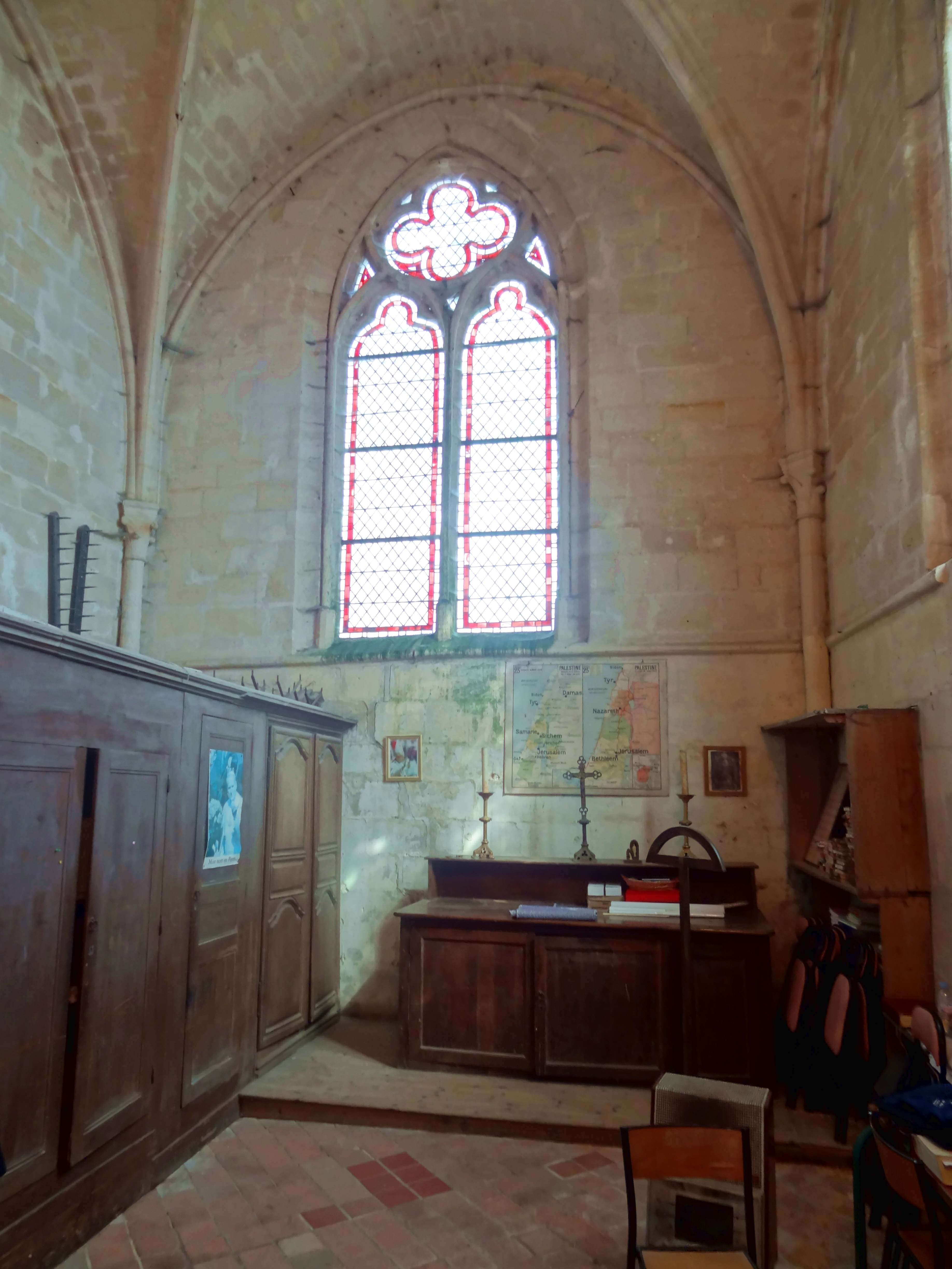 Intérieur de l'église - voir titre.